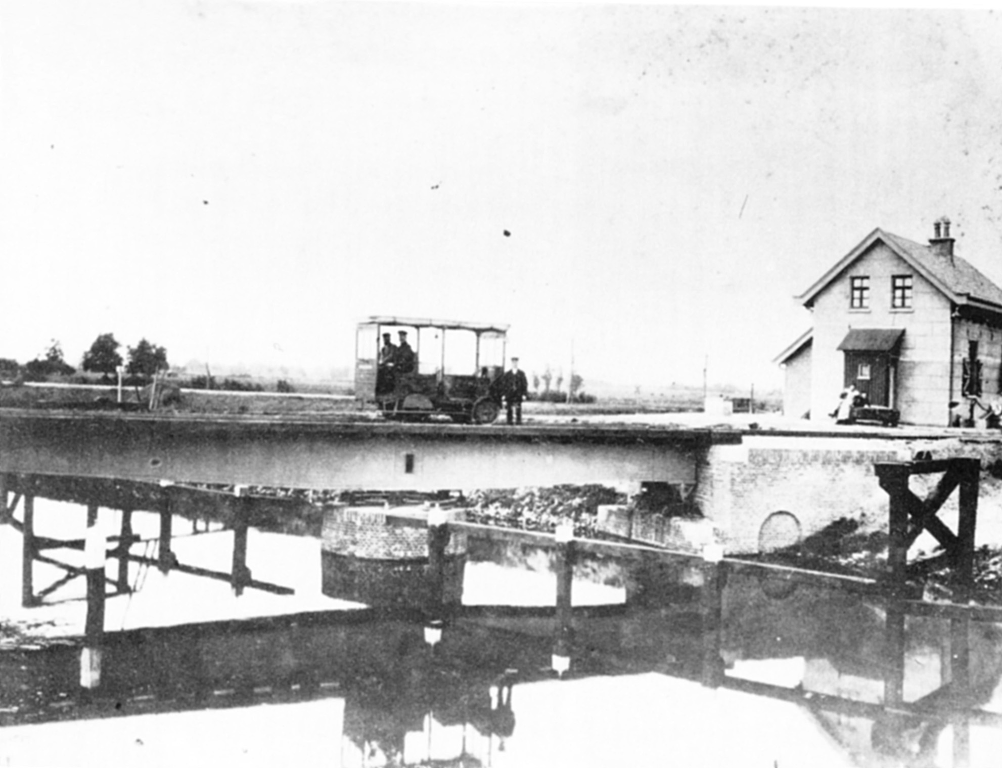 Kontrollfahrt nach Fertigstellung der Drehbruecke in Coevorden im Jahr 1910.